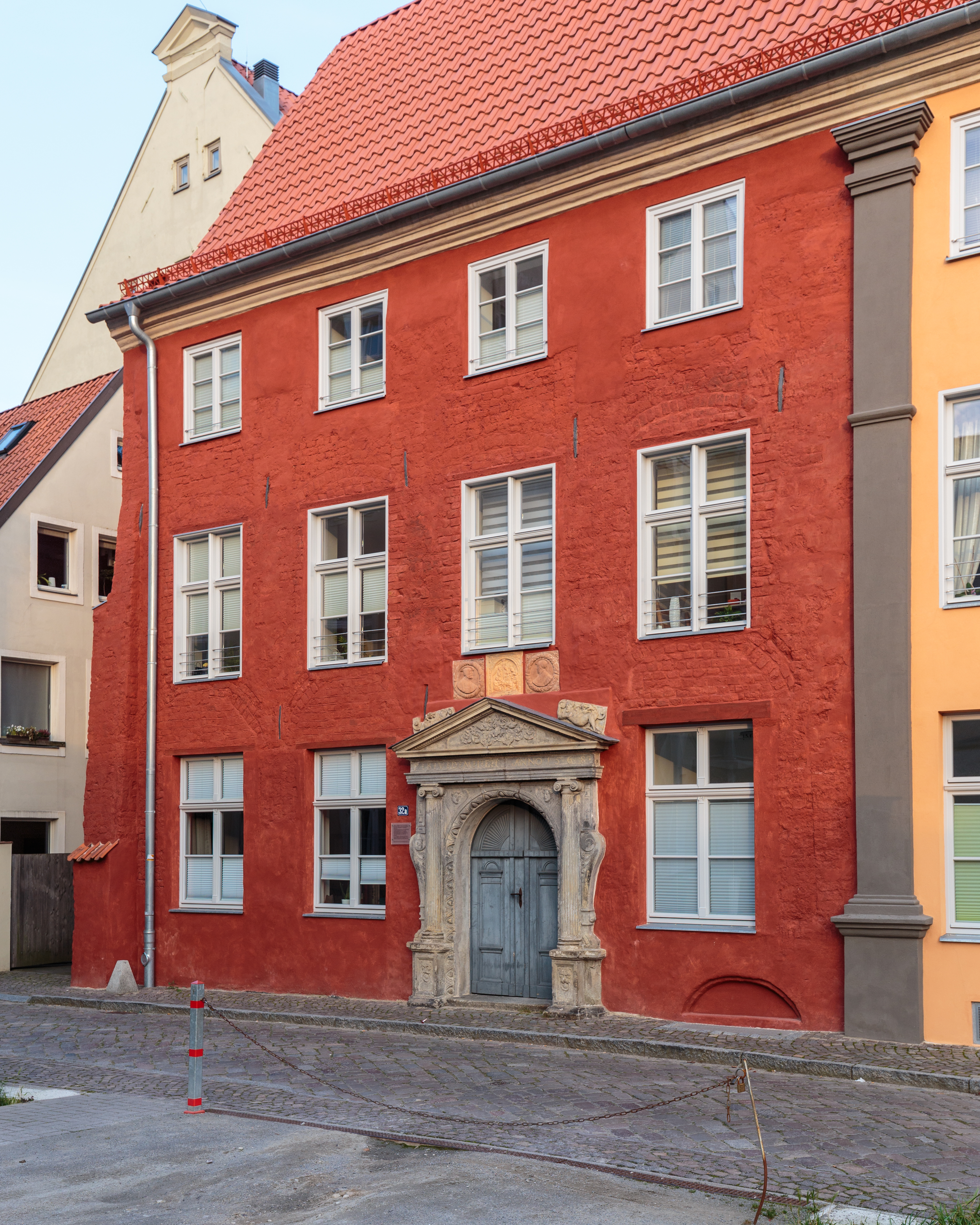 Jacobiturmstr. 32a Stralsund